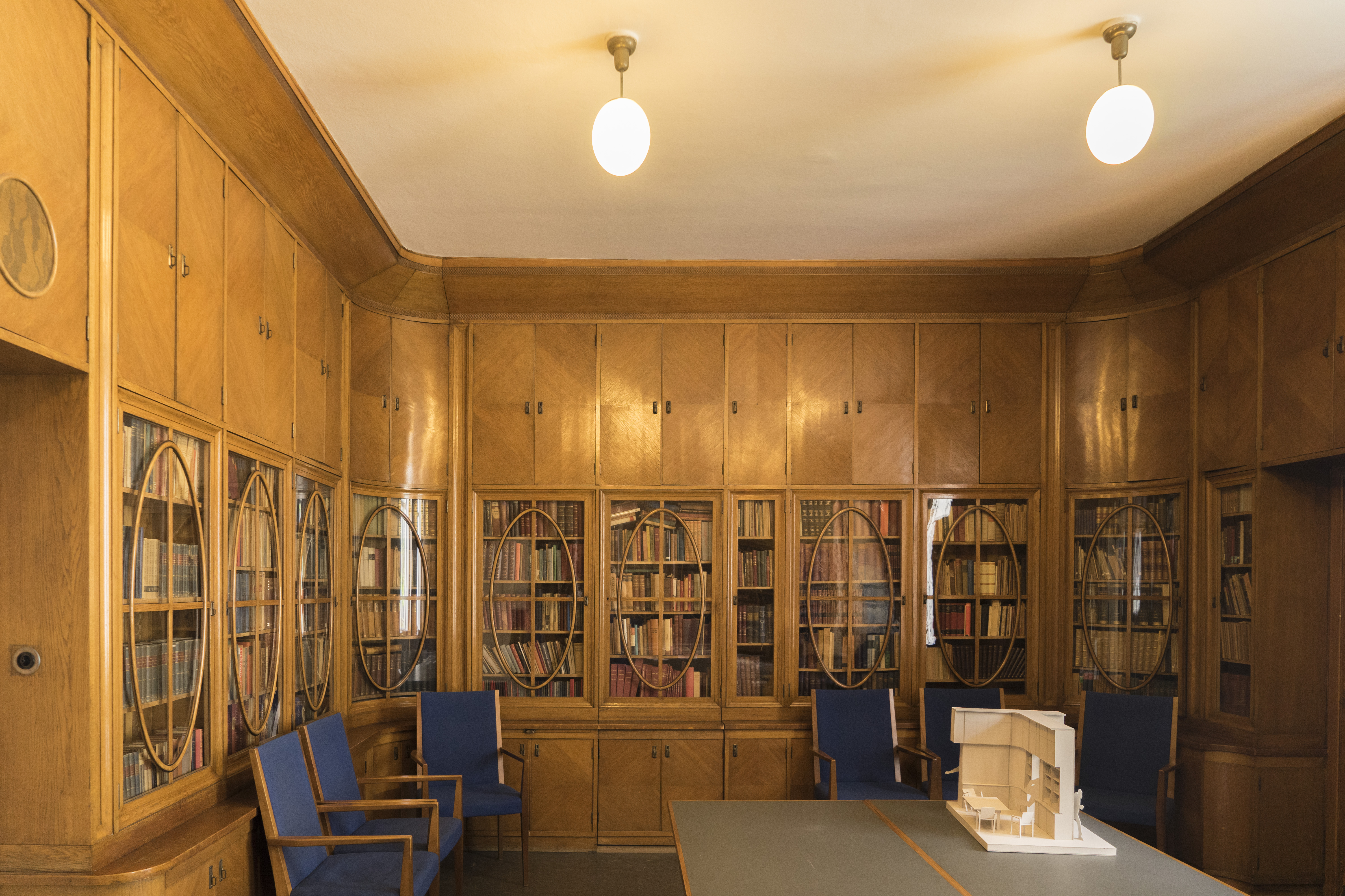 Vorwärts-Haus. Detail des Sitzungssaales, heute Austerlitz Zimmer genannt. Im zweiten Bücherschrank der Wand befindet sich eine Geheimtür. Dieses Bild wurde anlässlich des österreichischen Tags des Denkmals 2018 in Wien eingereicht.